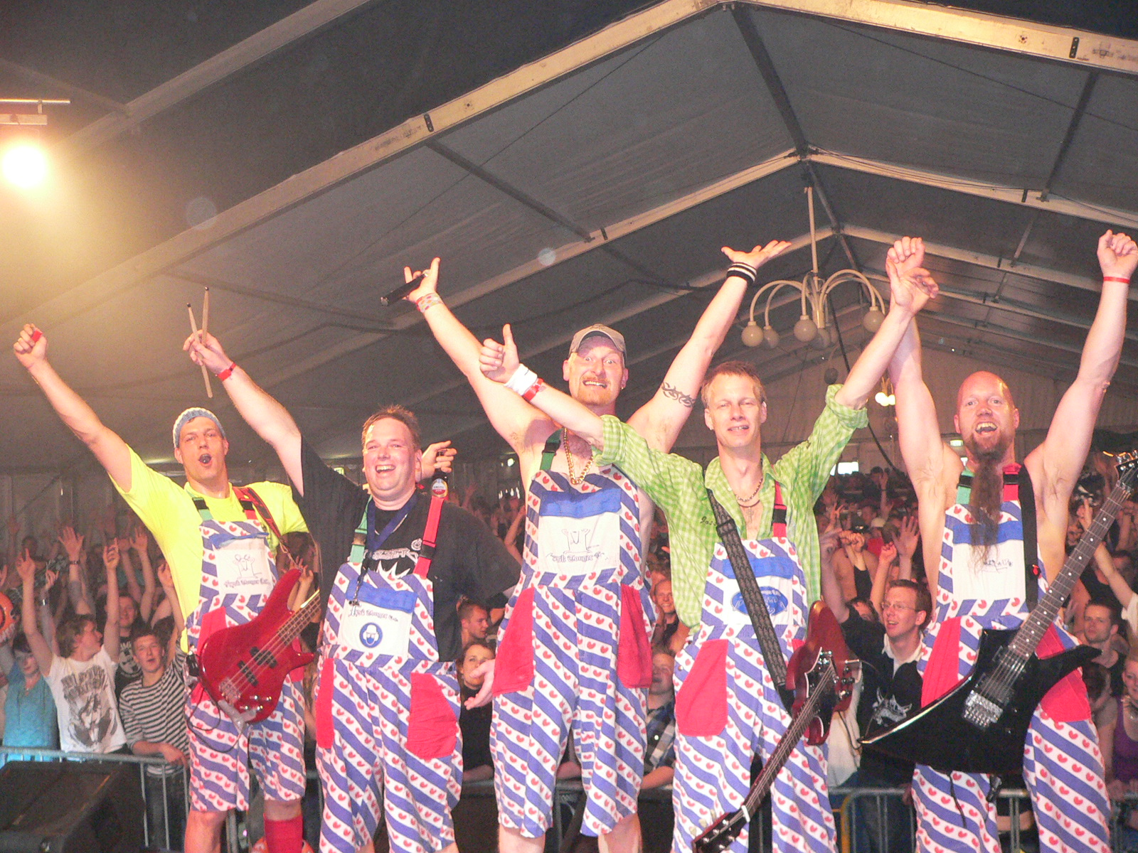 Jitiizer